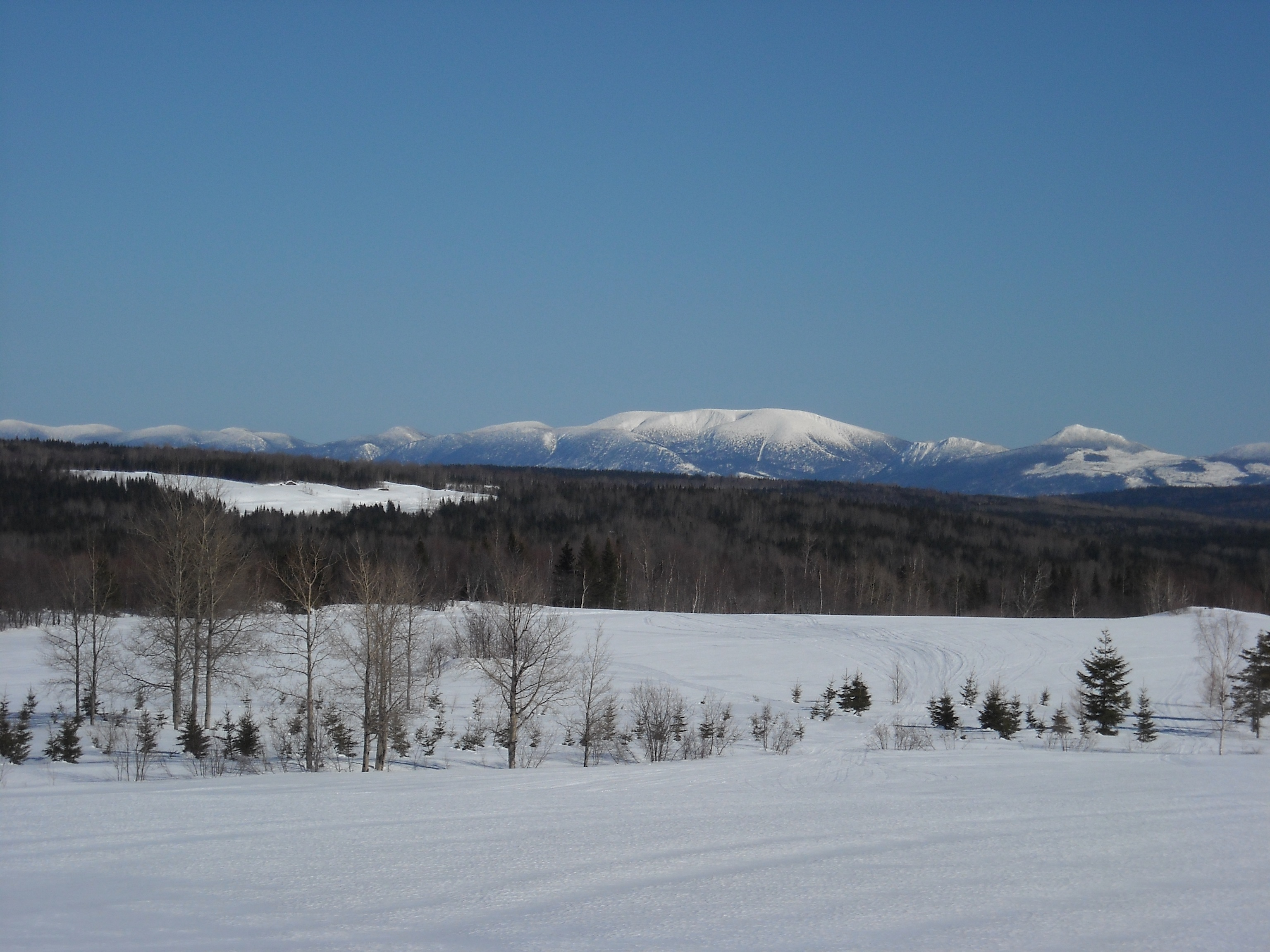 De droite à gauche : les monts Pointu, Craggy et Blanc et appartenant aux monts Chic-Chocs dans la réserve faunique de Matane en Matanie.